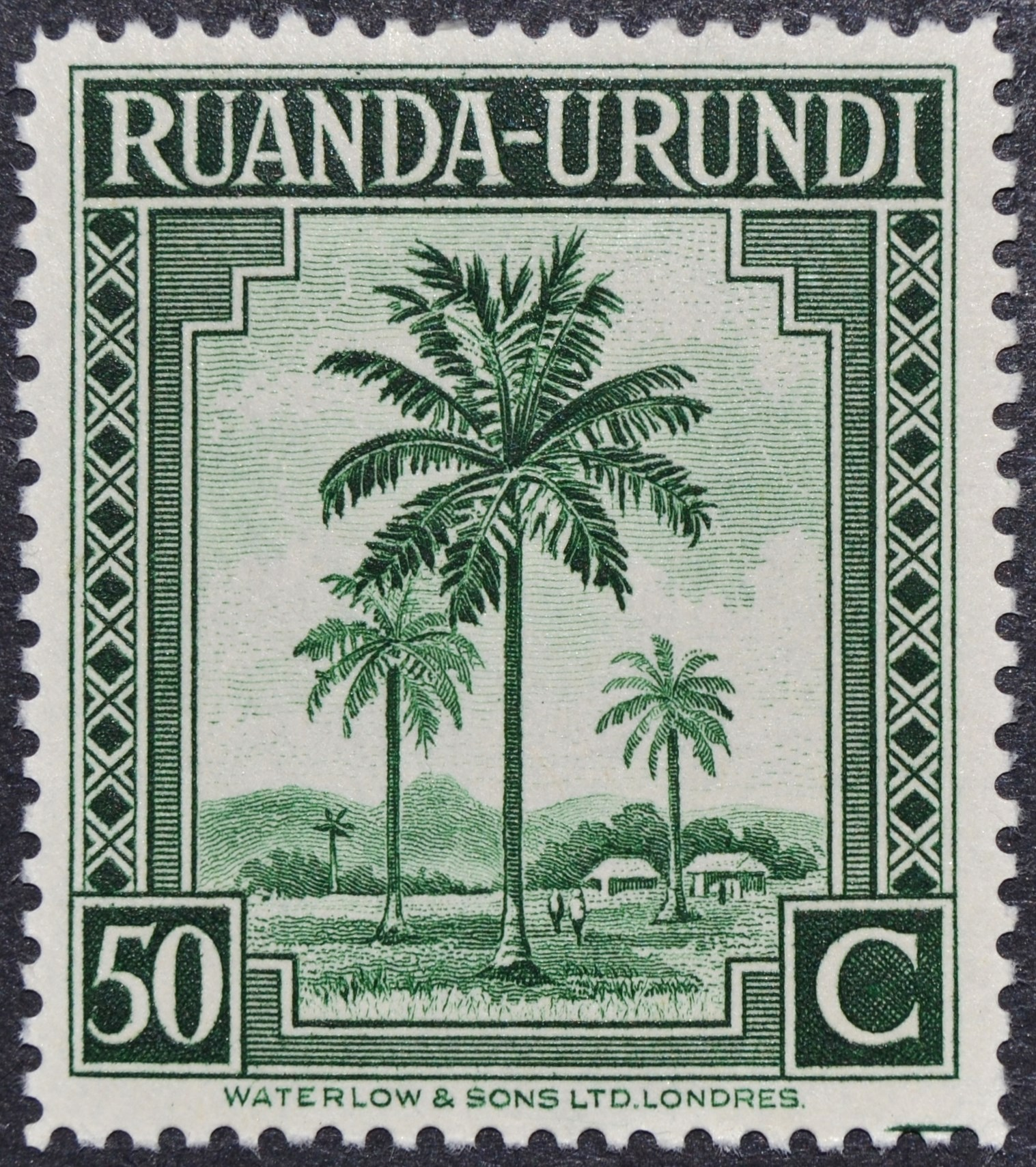 Selo de 1931, de 50c, incluído na emissão "Palmeiras".